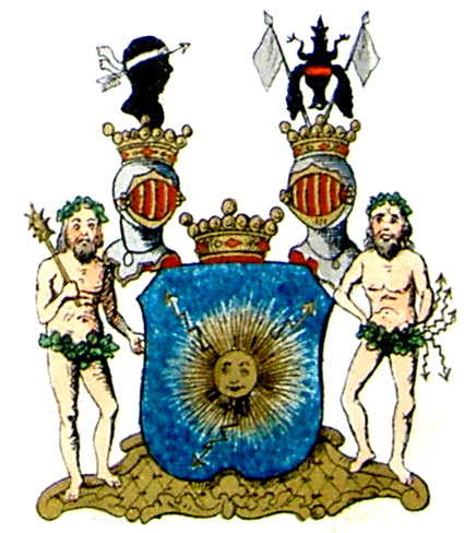 Friherrlig von Blixen-Finecke